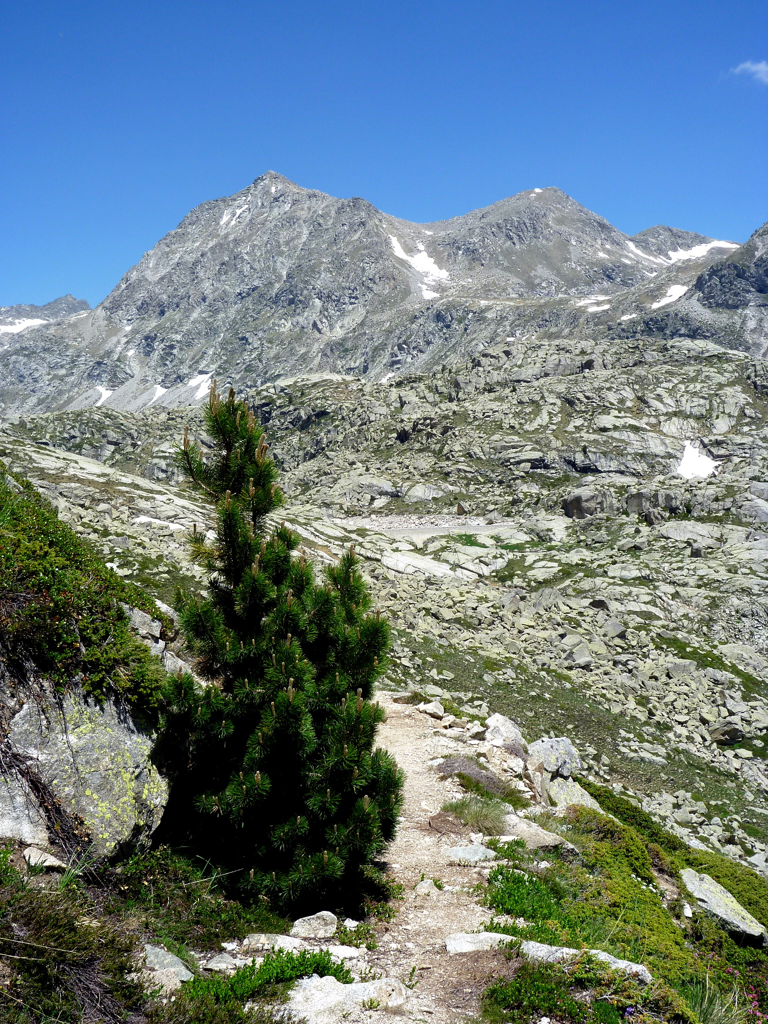 Presa de l'estany Fosser i pics Tort i dels Vidals des del camí de la collada de Font Sobirana. La Torre de Cabdella (Pallars Jussà - Catalunya)